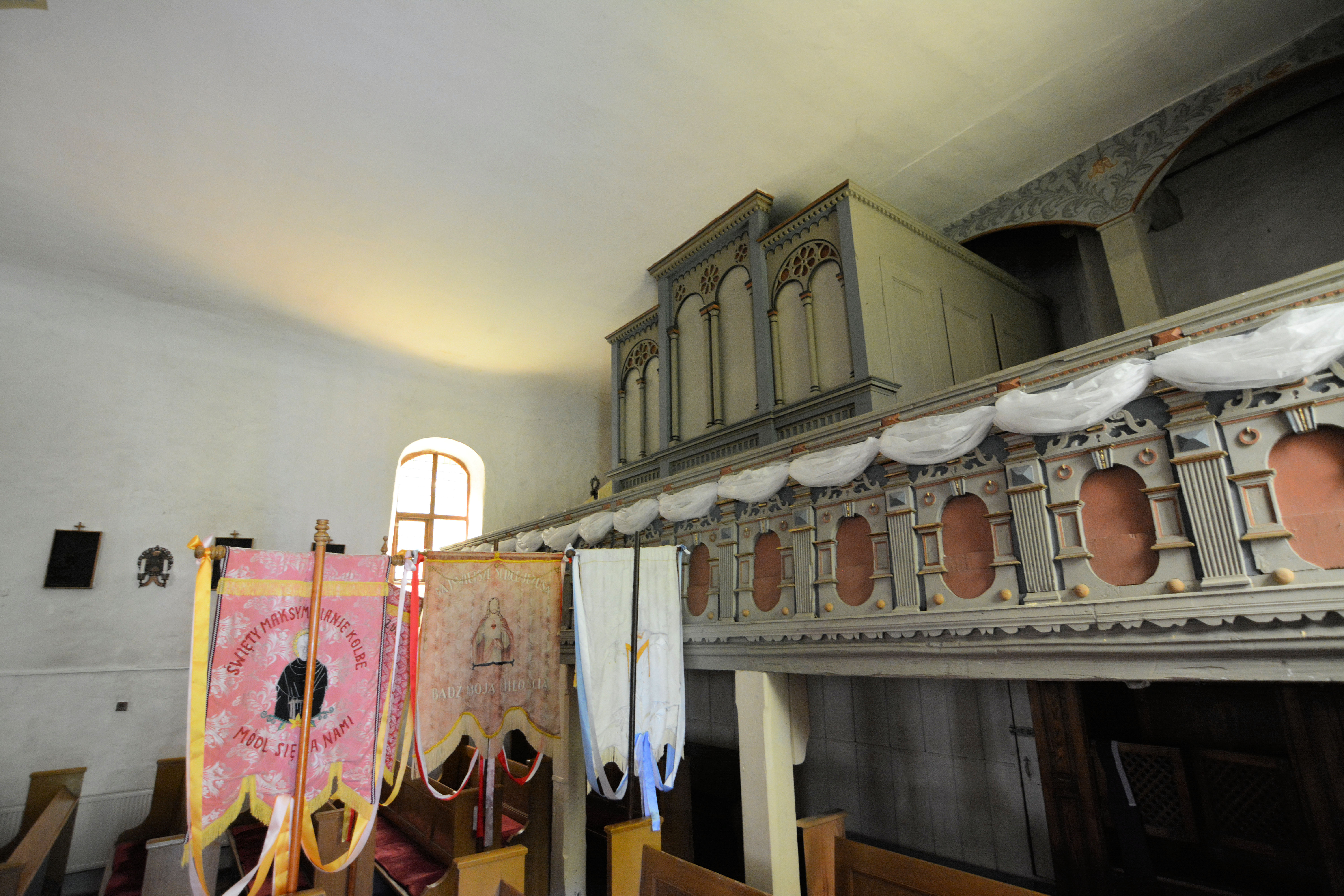 Kościół w Przelewicach